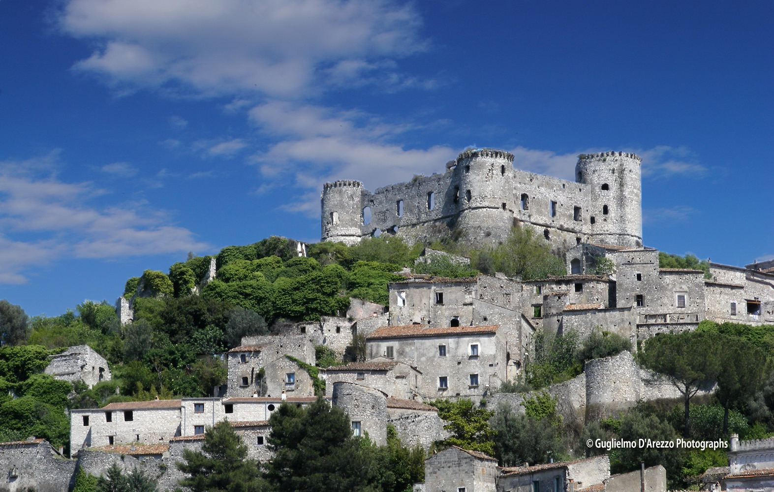 Guglielmo D'Arezzo, autore, Borgo medievale di Vairano Patenora, uso libero con attribuzione.